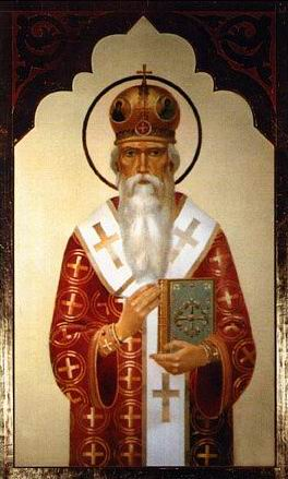 Митрополит Київський і всієї Русі Кипріан (1330-1406)